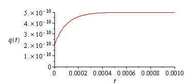 Opladen van een condensator over een weerstand dmv een gelijkspanning. De condensator is reeds 40 procent opgeladen.